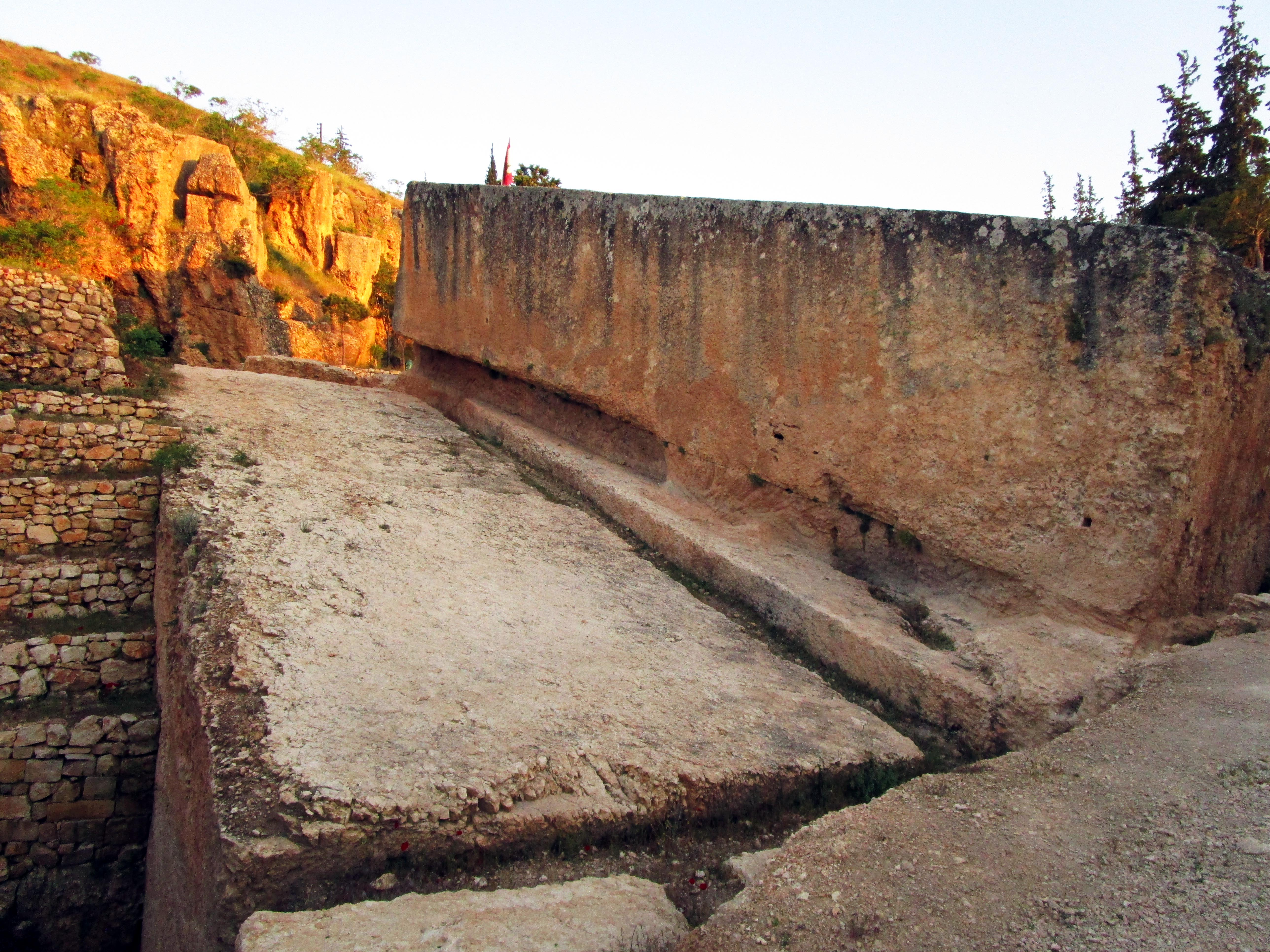 Megaliths in Baalbek quarry, Baalbek, Lebanon